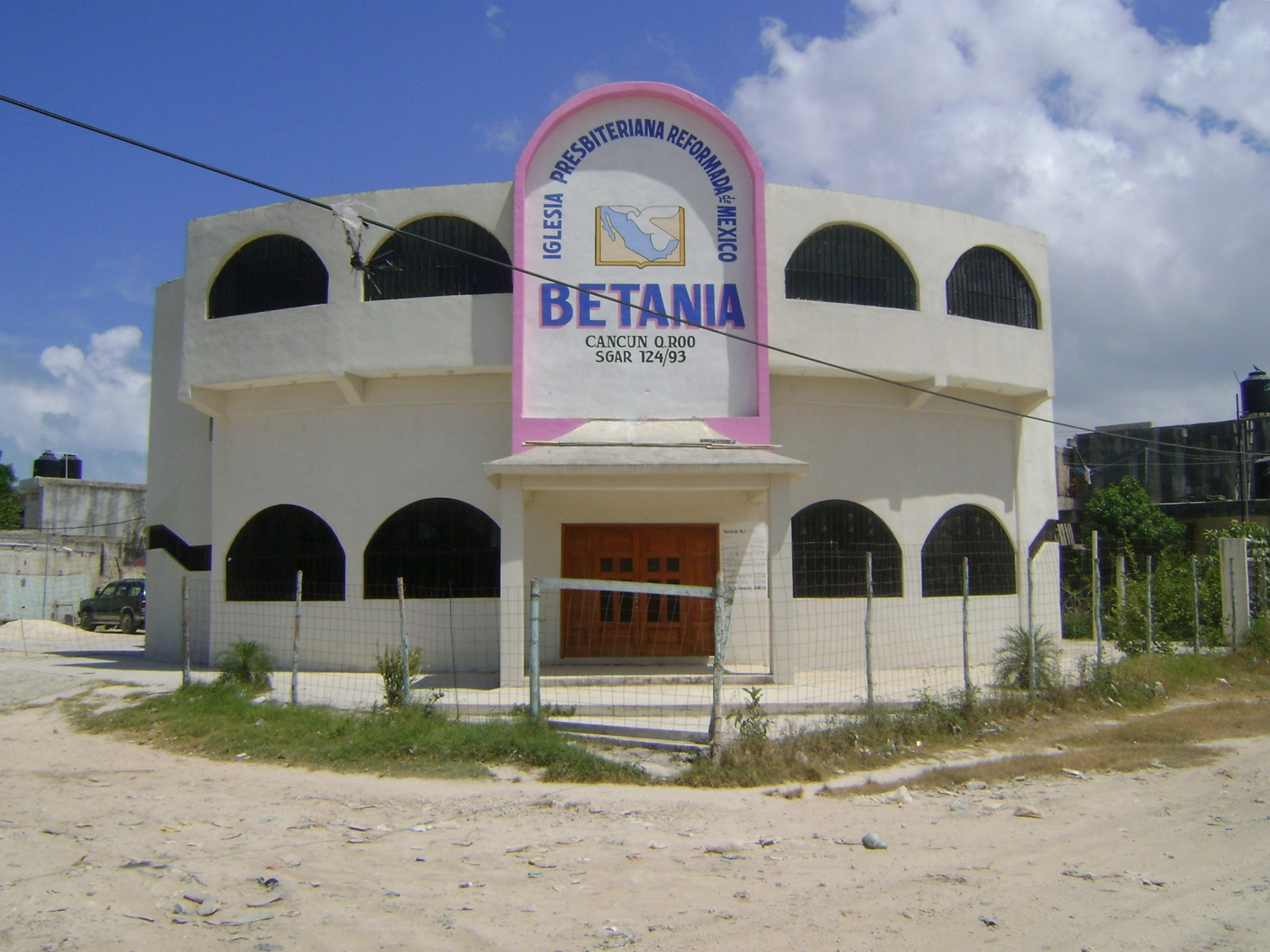 Iglesia Presbiteriana Reformada de México Betania, Reg 235 Mza 10 Lt. 15-18, Cancún, Q. Roo de: Iglesia Presbiteriana Reformada de México, A.R.